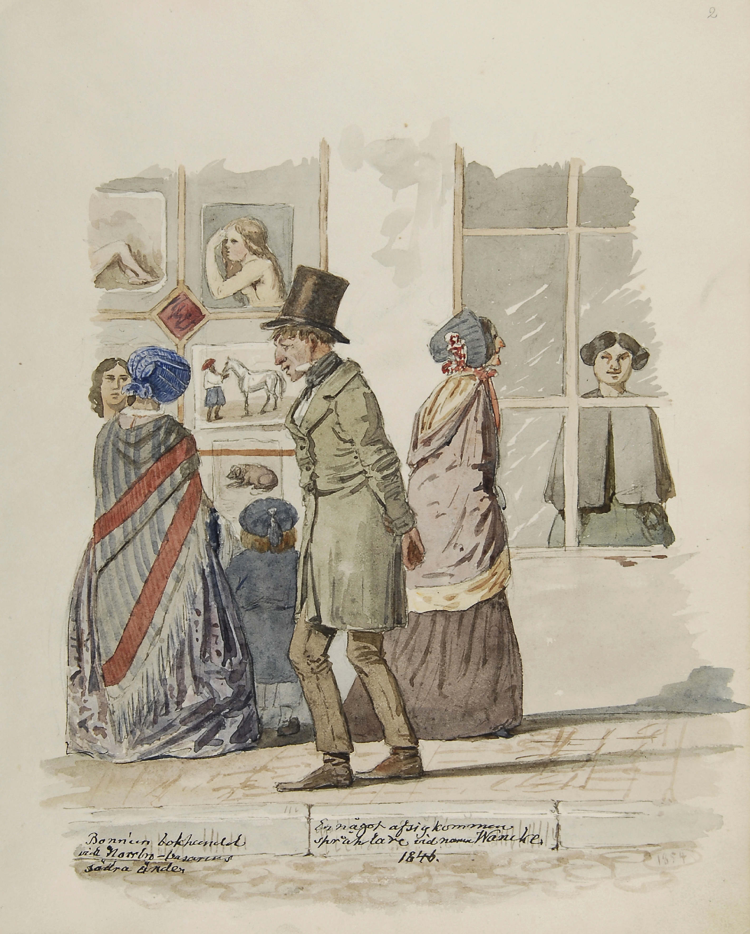 Bonniers bokhandel vid Norrbro-basarens södra änden. En något afsigkommen språklärare vid namn Wanke 1846.